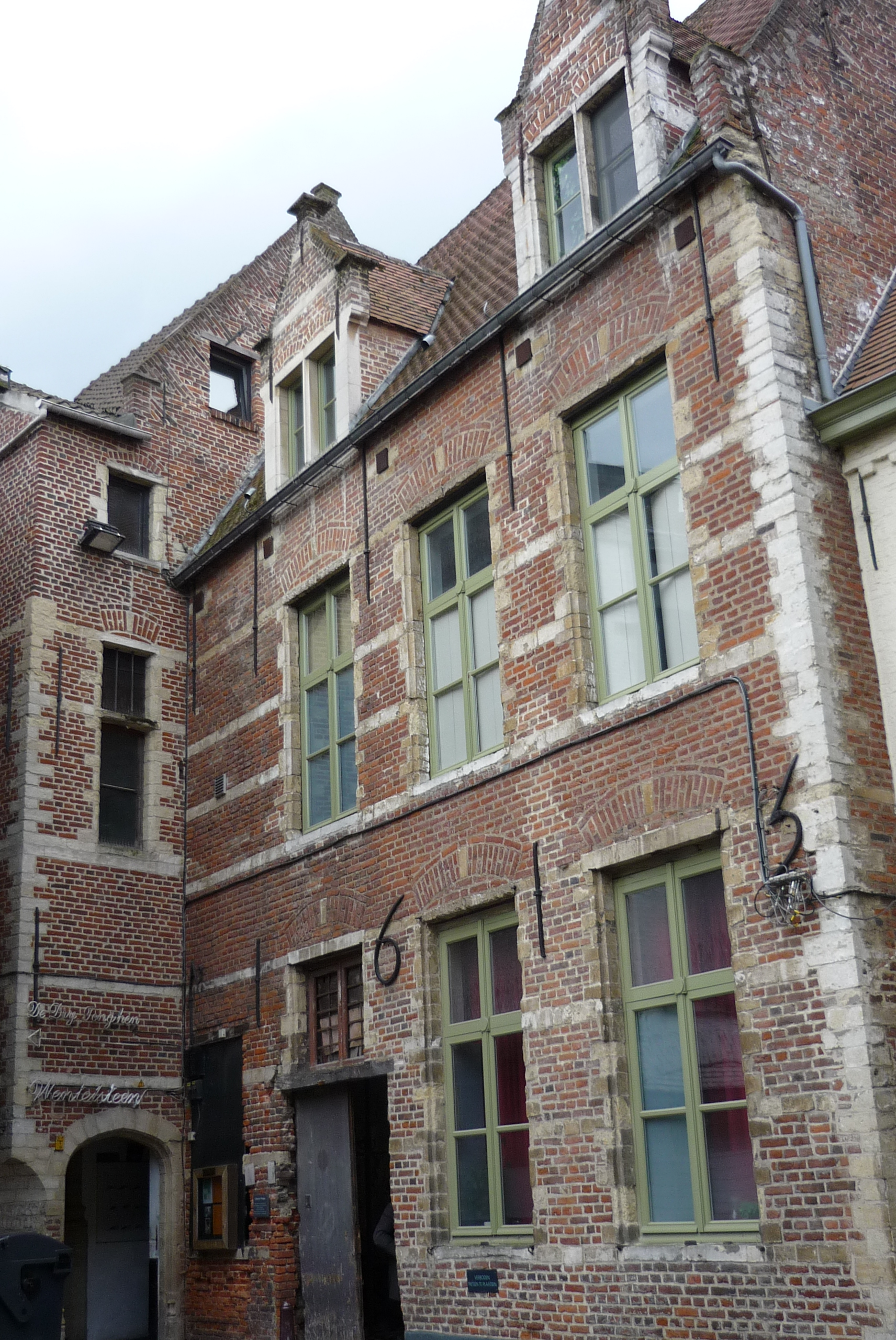 État actuel du "Collegium Trilingue" à Louvain